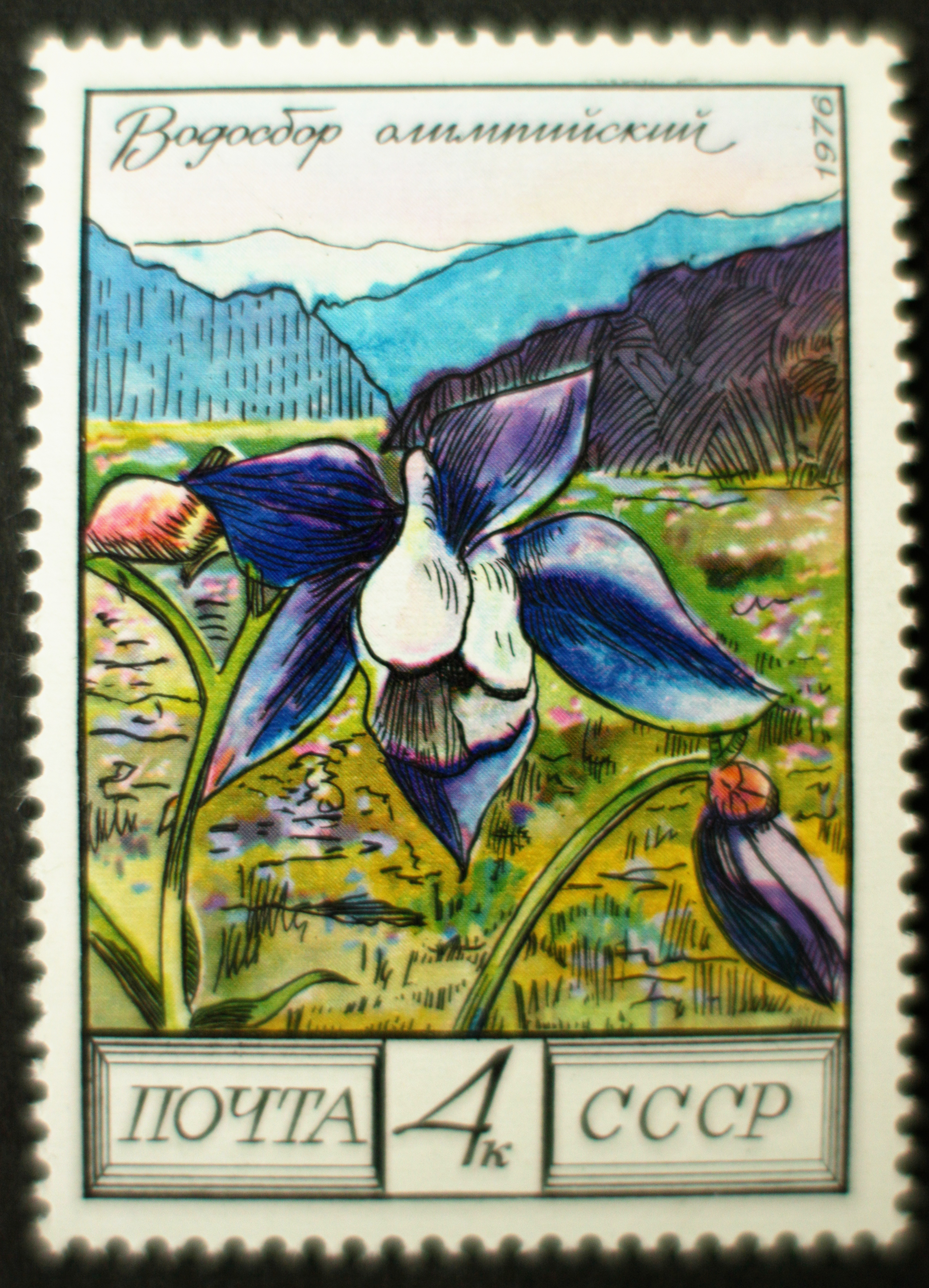 Briefmarke, Sowjetunion